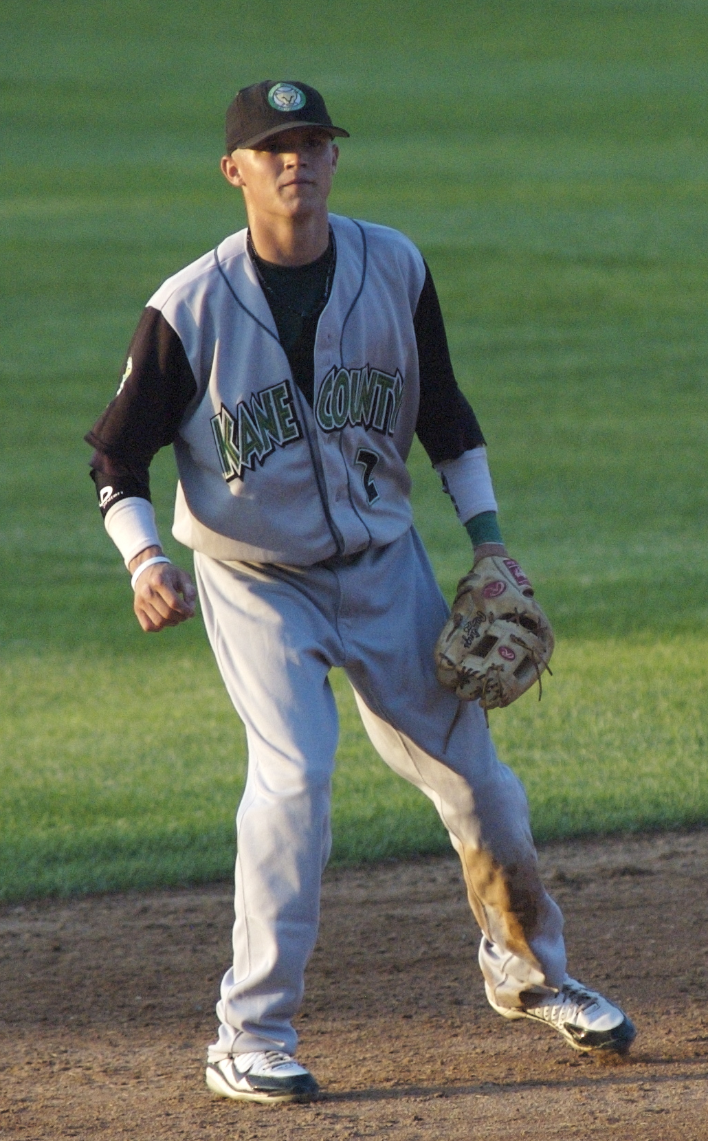 Justin Sellers